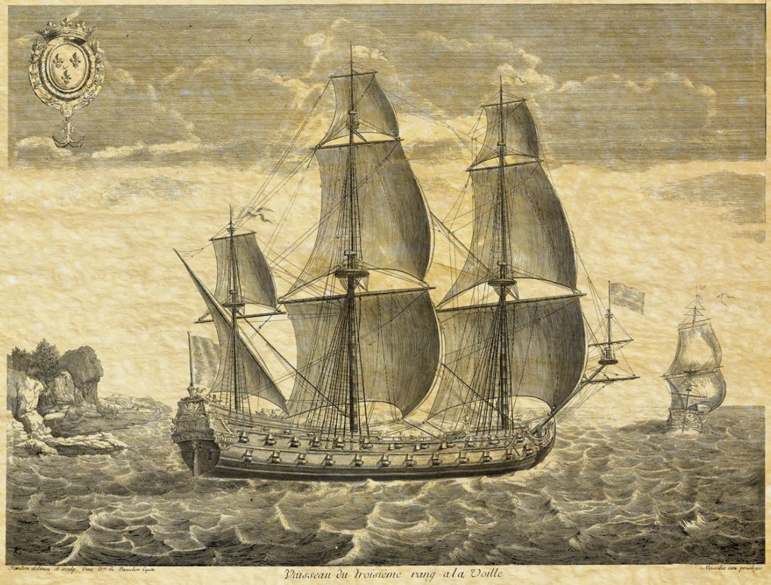 Dessin anonyme d'un vaisseau français de 50 canons dit de 3ème rang dans les années 1680. Dessin publié dans la Description de la Marine Royale de sa Majesté Louis XIV en 1685. Taille : 585 mm x 410 mm.